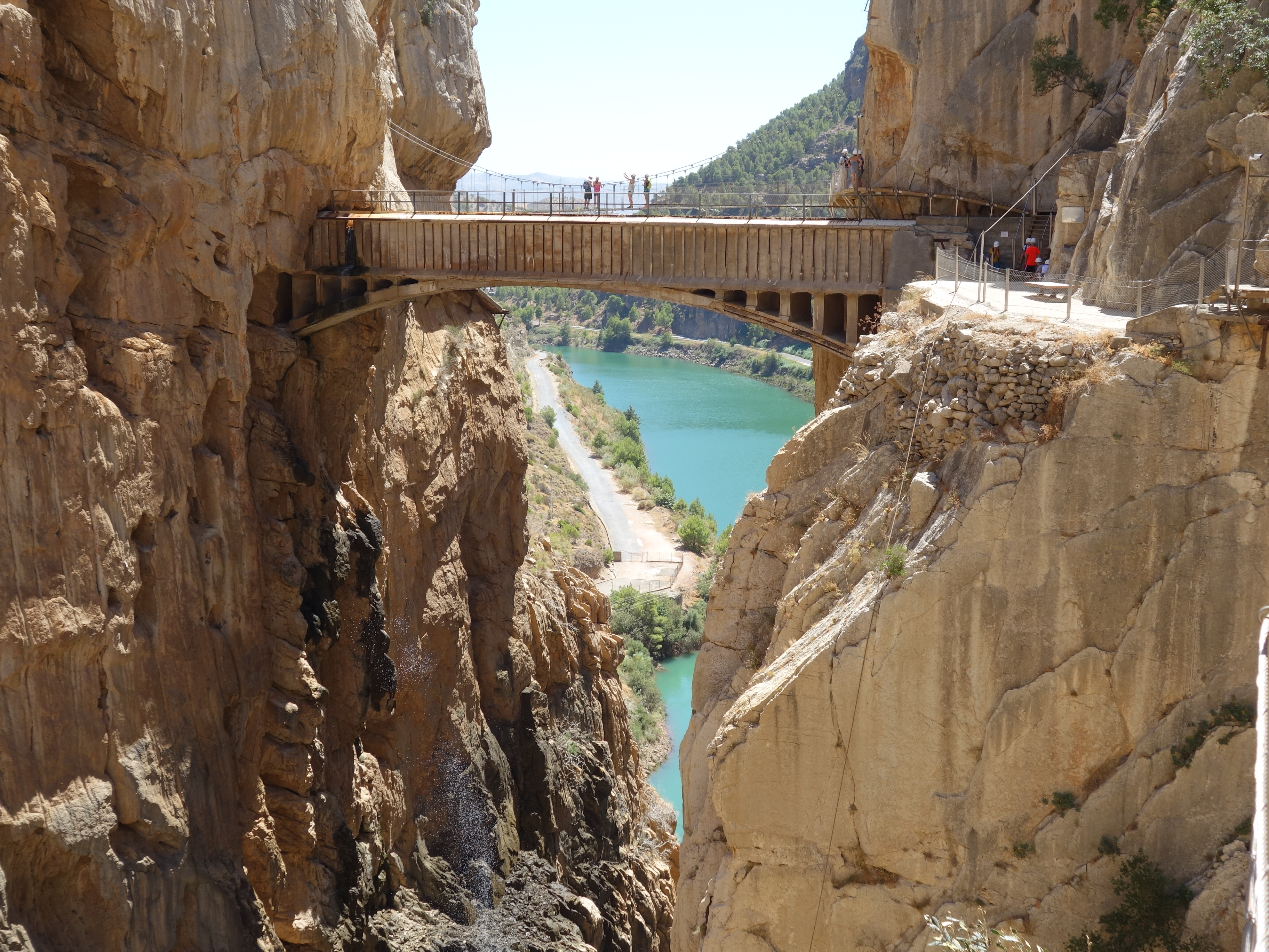 Desfiladero de los Gaitanes This is a photography of a Special Area of Conservation in Spain with the ID: ES6170003. Natura2000 entry, EEA entry